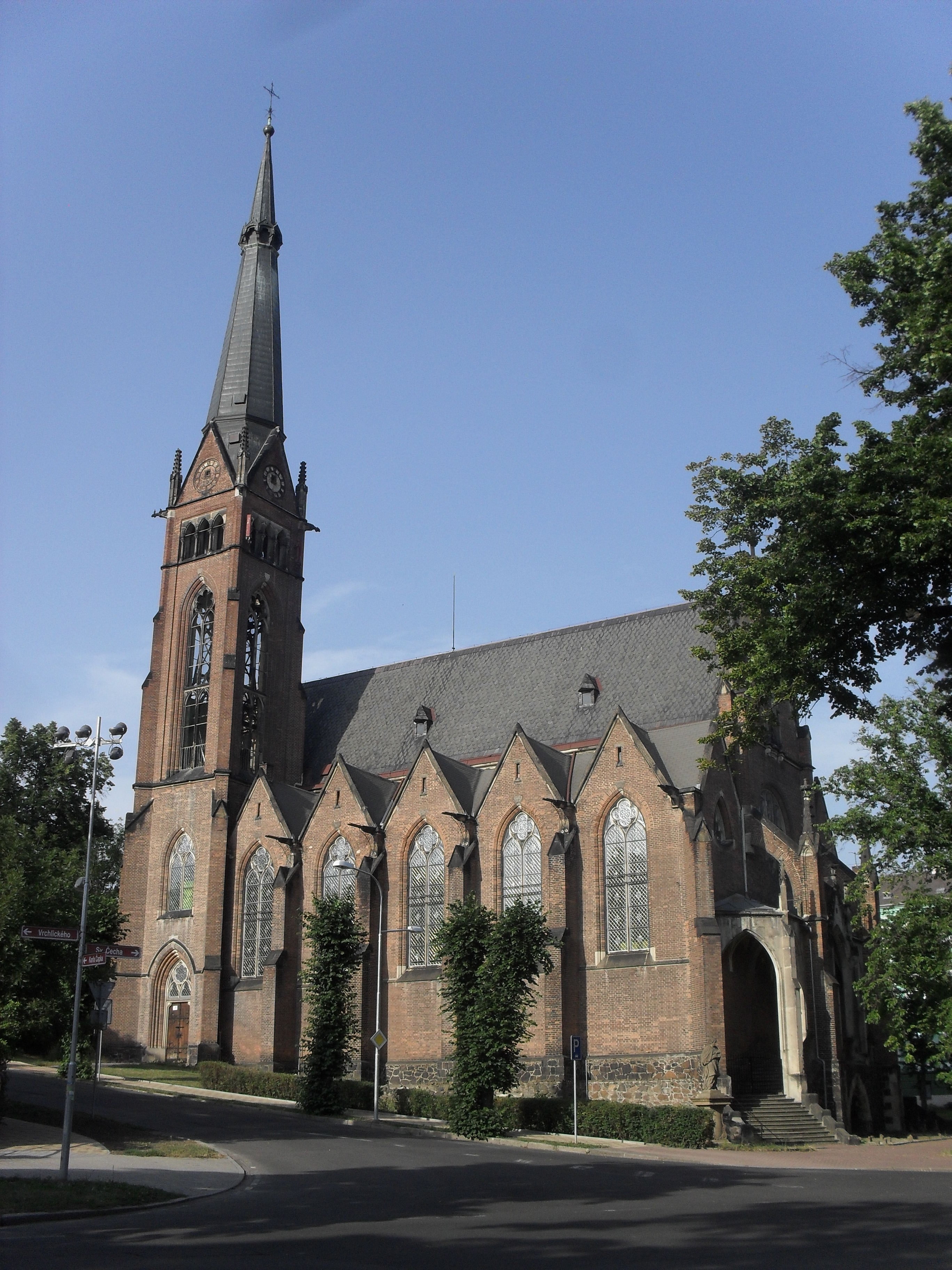 Teplický kostel sv. Alžběty.